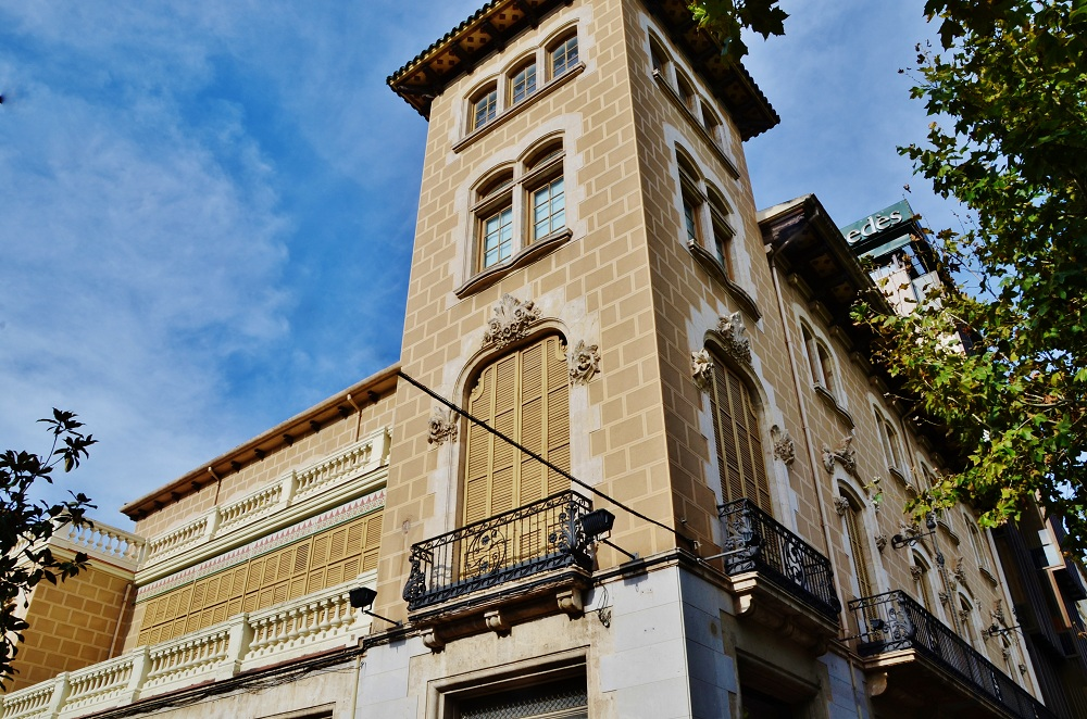 Casa Elias Valero (Vilafranca del Penedès)